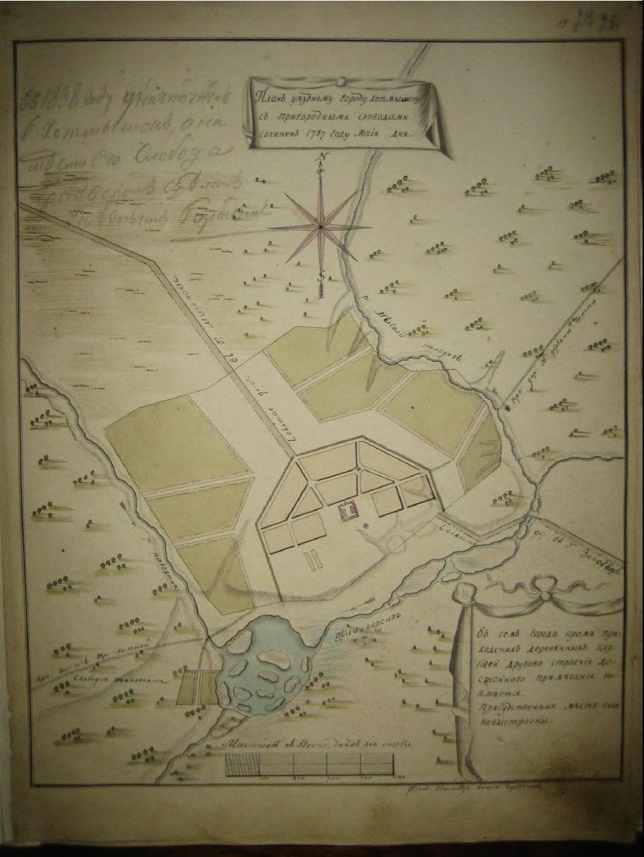 Російська імперія. Харківське намісництво. Мапа повітового міста Хотмижськ з альбому мап намісництва. 1787 рік.